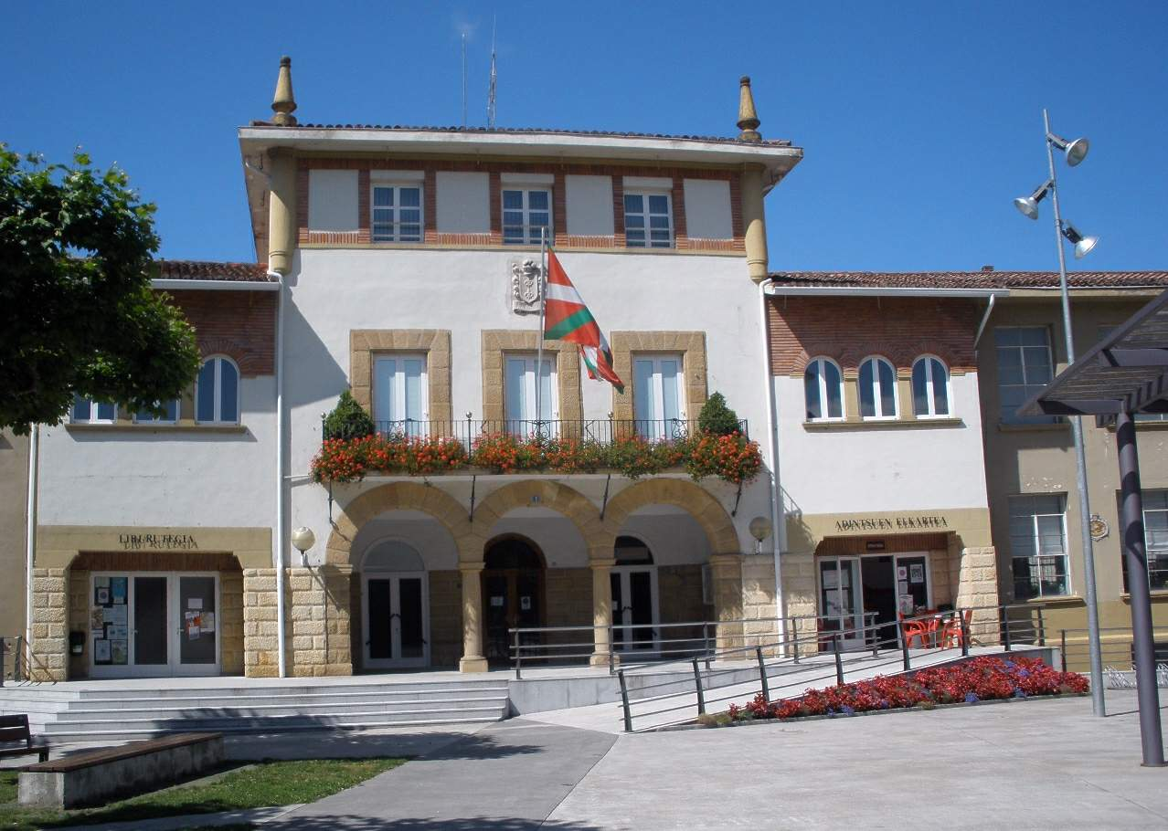 Ayuntamiento de Lezama (Bizkaia)